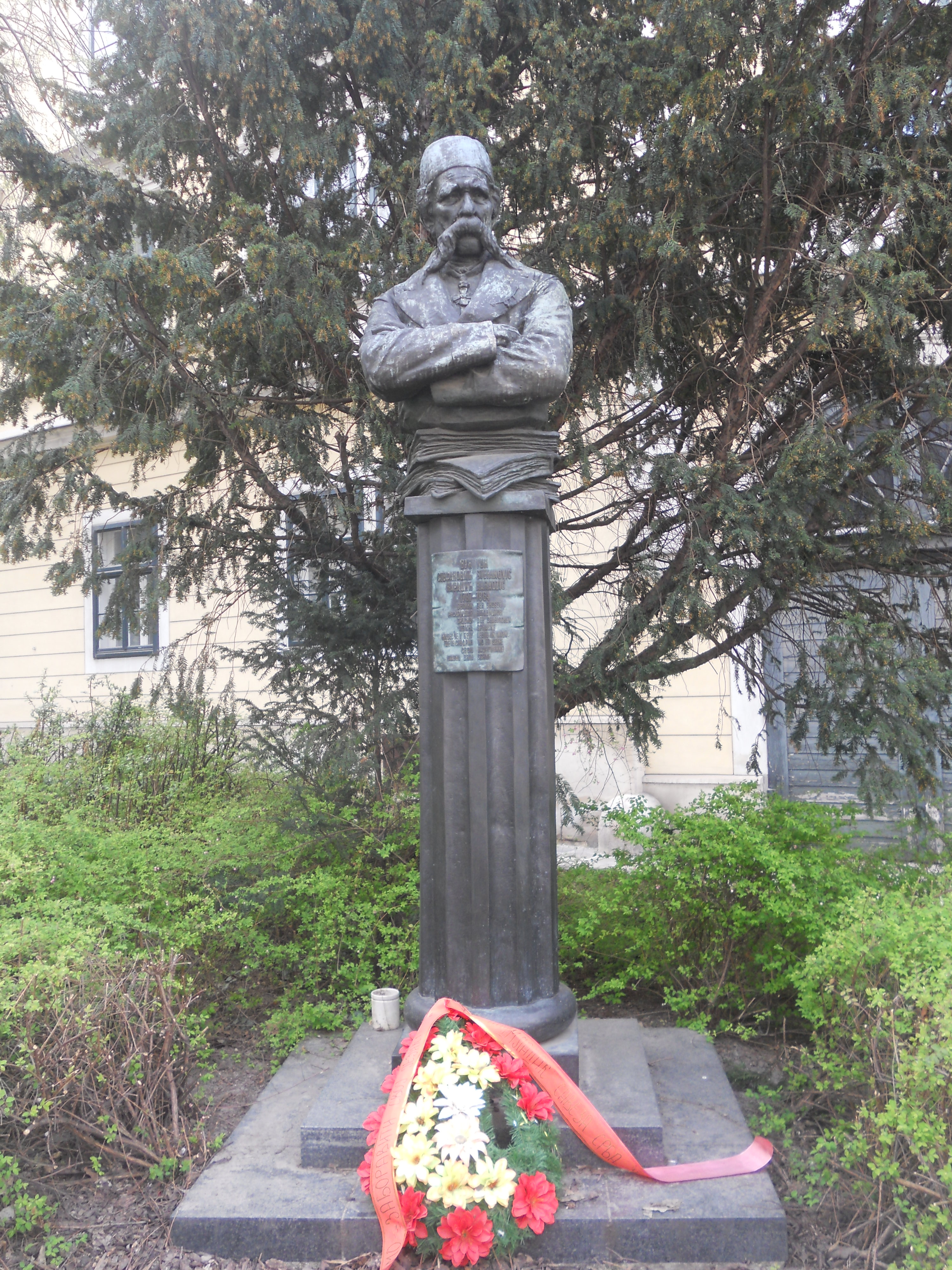 Vuk Karadžić-Denkmal